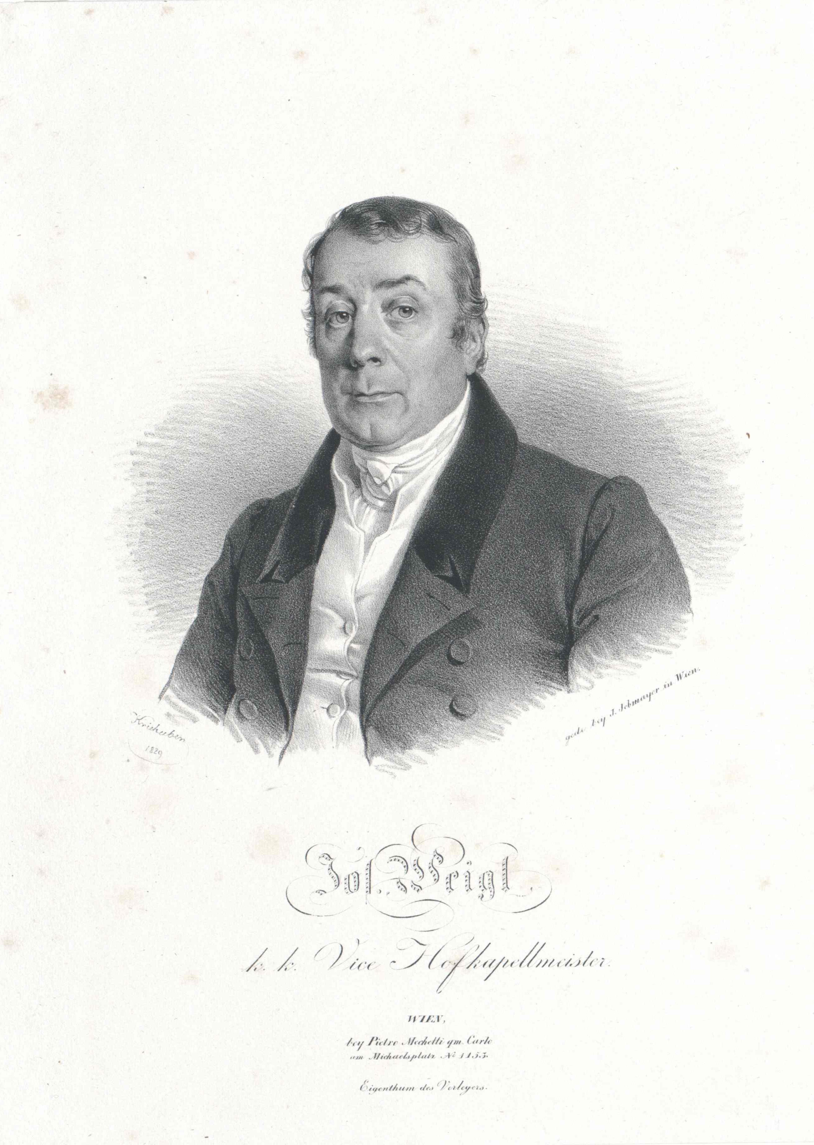 Joseph Weigl, Lithographie von Josef Kriehuber, 1829 Eigenes Foto einer Originallithographie